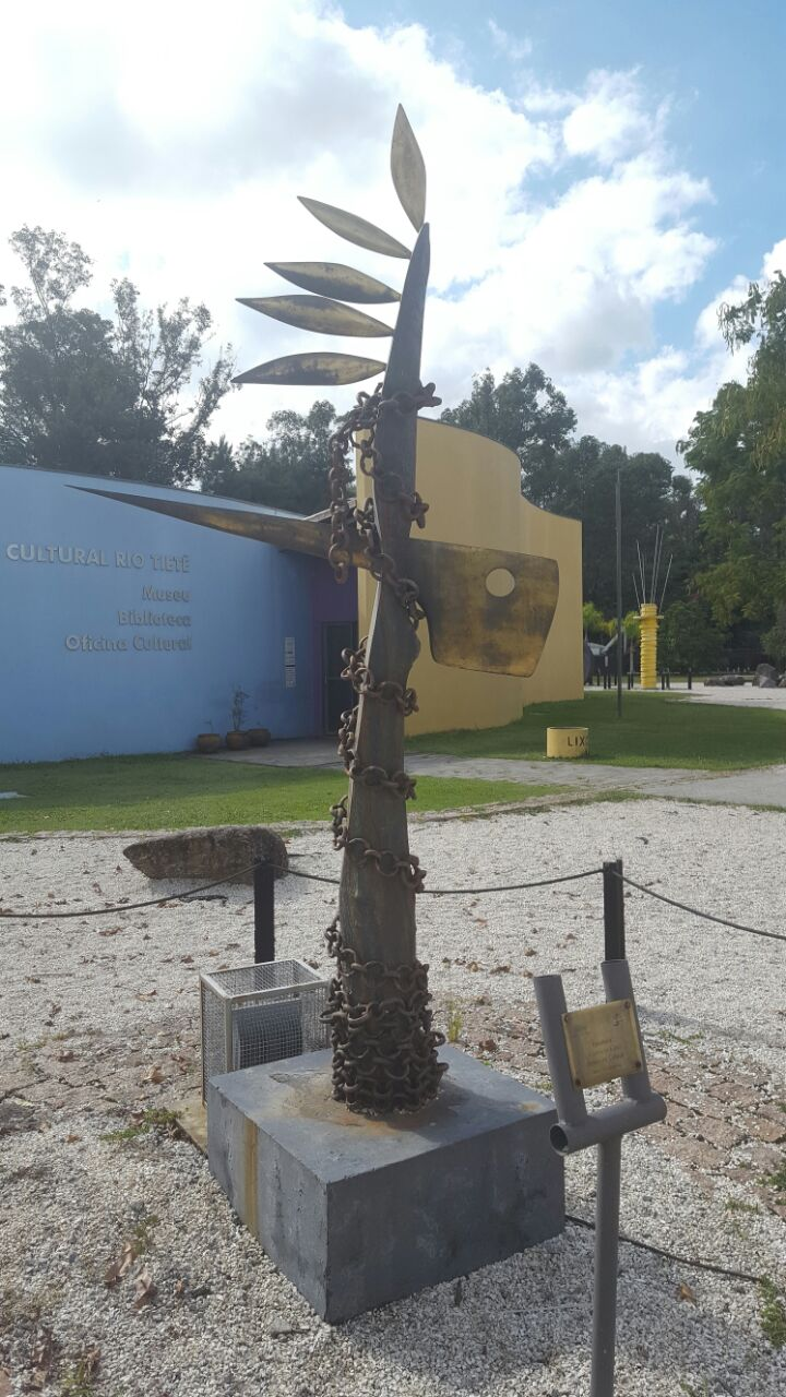 Árvore na cidade por Elvio Becheroni